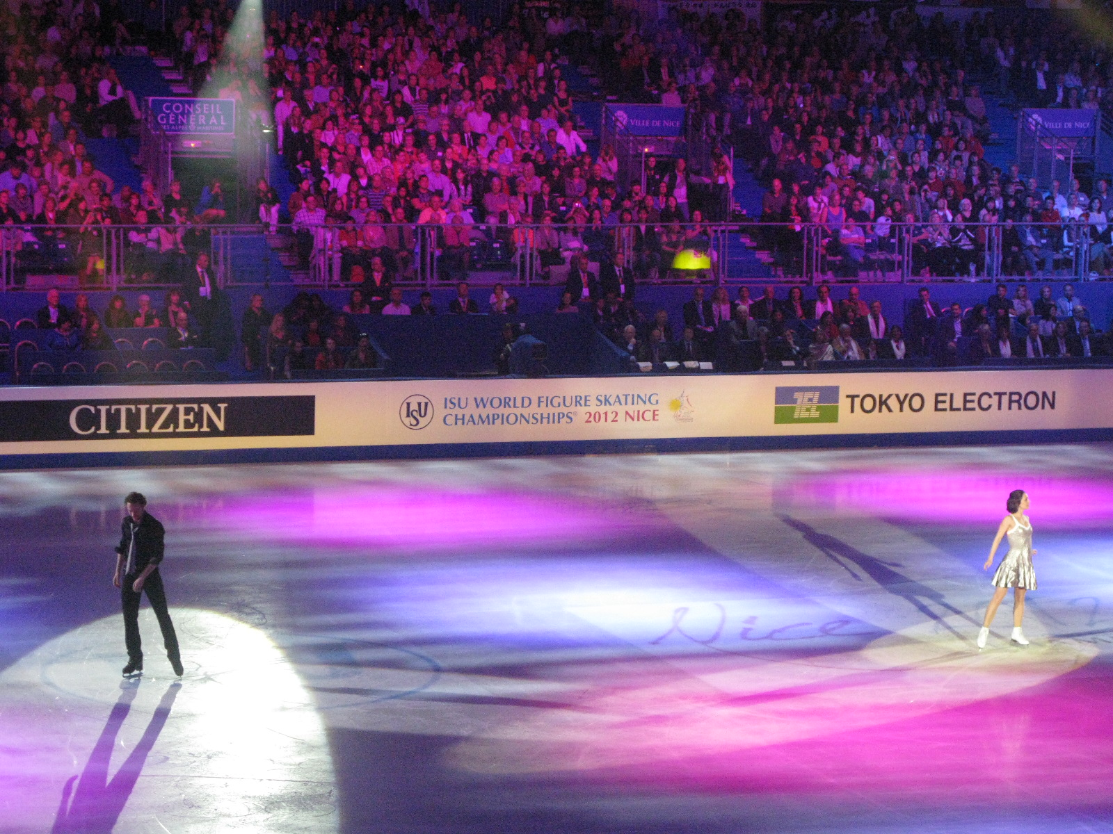 Nathalie Péchalat et Fabian Bourzat au gala des Championnats du monde de patinage artistique 2012 à Nice.